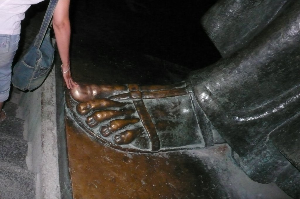 Pied de la statue de Saint-Domnius, Saint protecteur de la ville de Split, Croatie. Toucher le pied de cette statue, porterait chance.